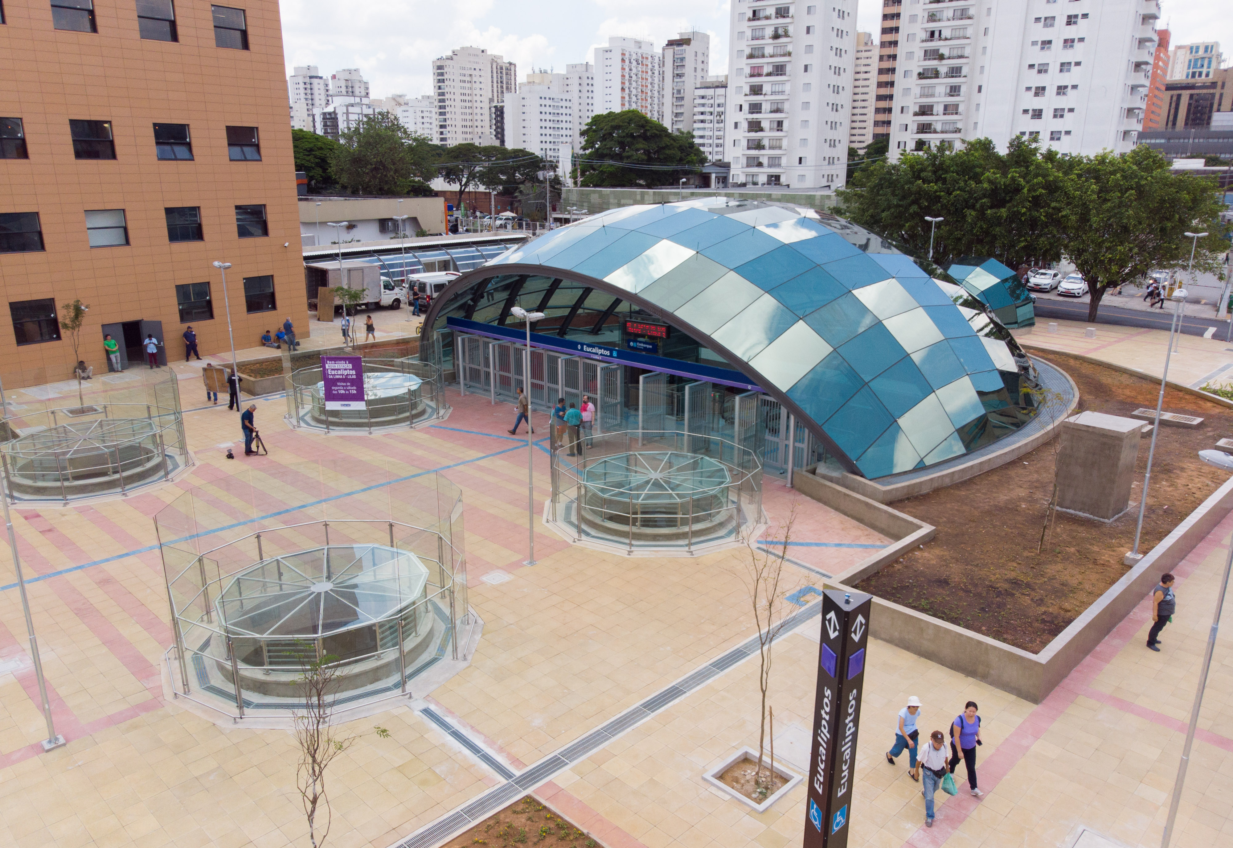 O Governador do Estado de São Paulo, Geraldo Alckmin, participa da inauguração da Estação Eucaliptos da Linha 5 - Lilás, do Metr .Local: São Paulo/SP Data: 00/00/2018 Foto: Governo do Estado de São Paulo